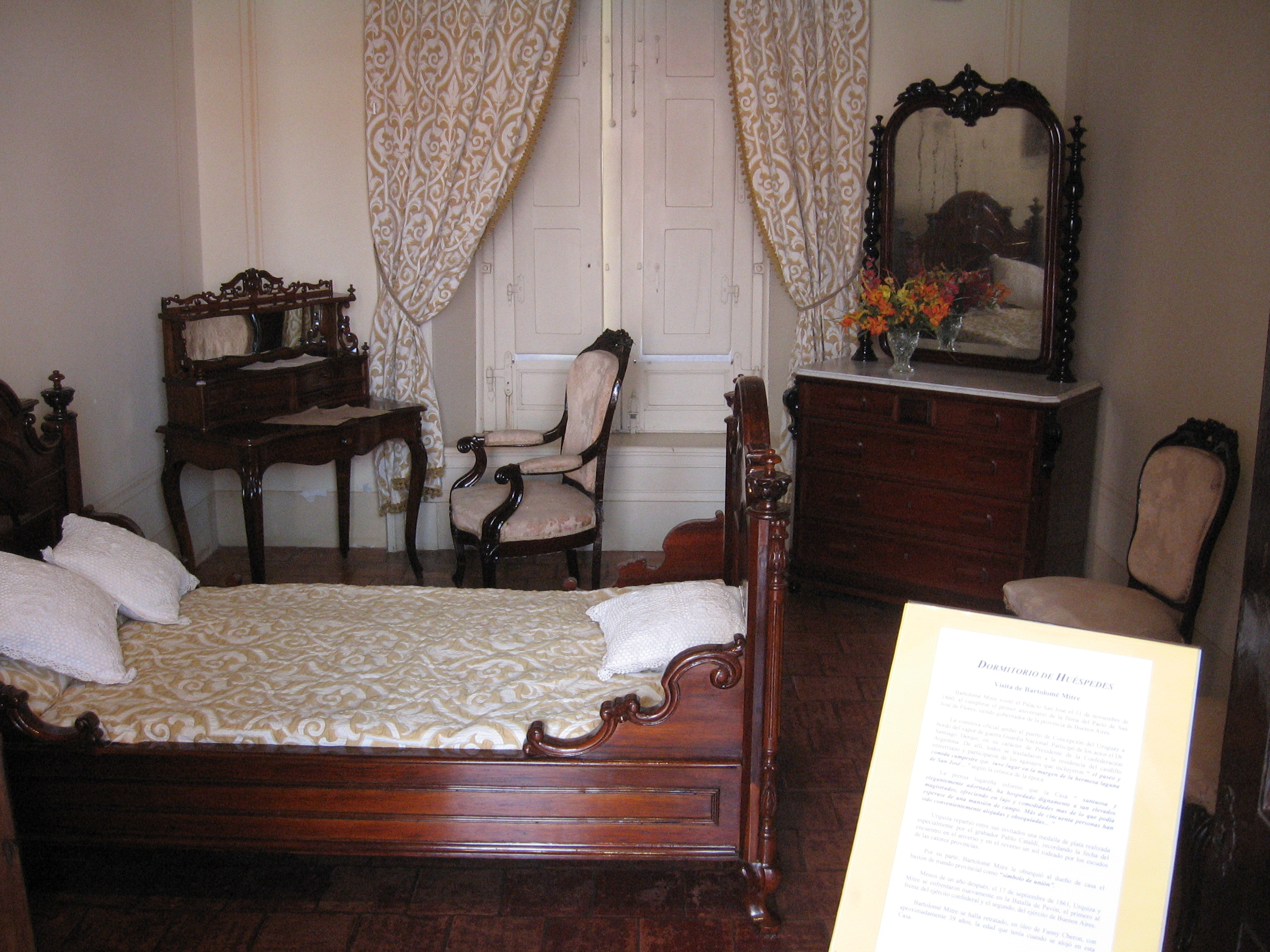 Dormitorio utilizado por Bartolomé Mitre en su visita al Palacio San José